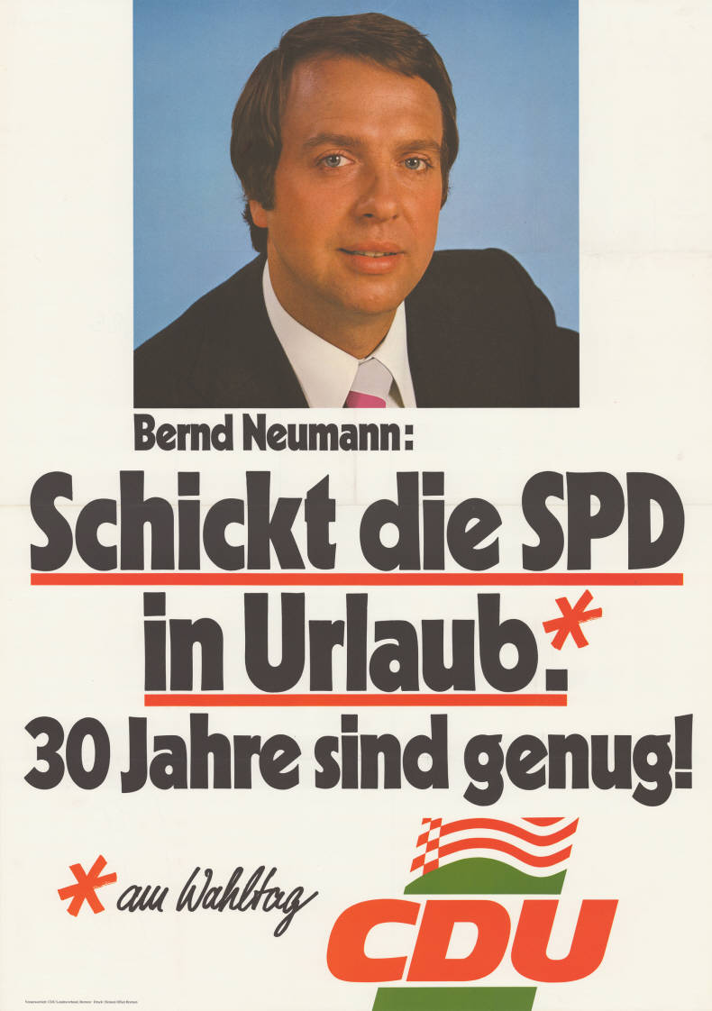 Bernd Neumann: Schickt die SPD in Urlaub.* 30 Jahre sind genug! * am Wahltag CDU Abbildung: Porträtfoto Plakatart: Kandidaten-/Personenplakat mit Porträt Auftraggeber: Verantw.: CDU Landesverband Bremen Drucker_Druckart_Druckort: Heinatz Offset, Bremen Objekt-Signatur: 10-005 : 401 Bestand: Plakate zu Bürgerschaftswahlen Bremen (10-005) GliederungBestand10-18: Plakate zu Bürgerschaftswahlen Bremen (10-005) » CDU Lizenz: KAS/ACDP 10-005 : 401 CC-BY-SA 3.0 DE